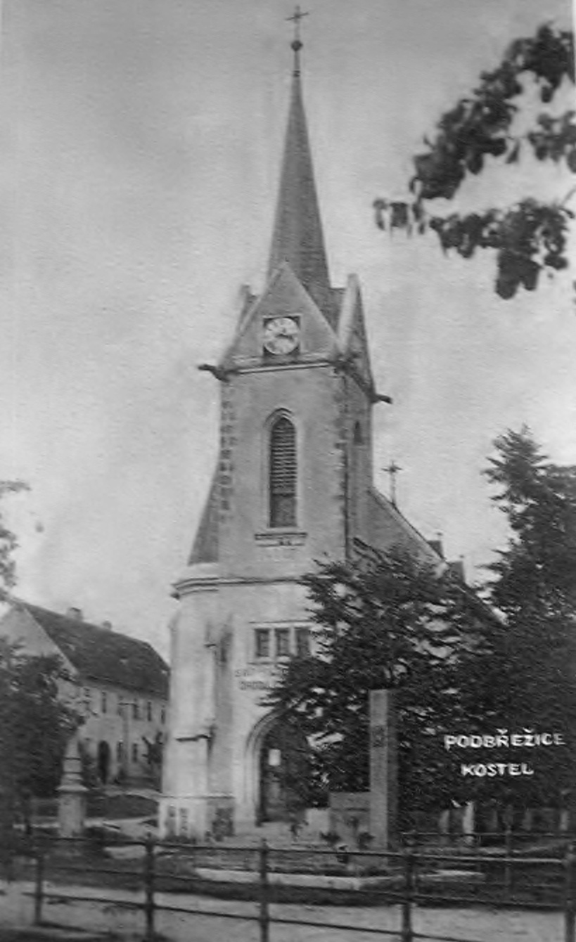 Kostel svatého Petra a Pavla Podbřežice (Vyškov- Czech republic)